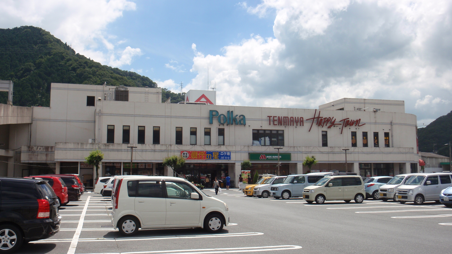 岡山県高梁市にある天満屋ハピータウン高梁店（通称ポルカ）。